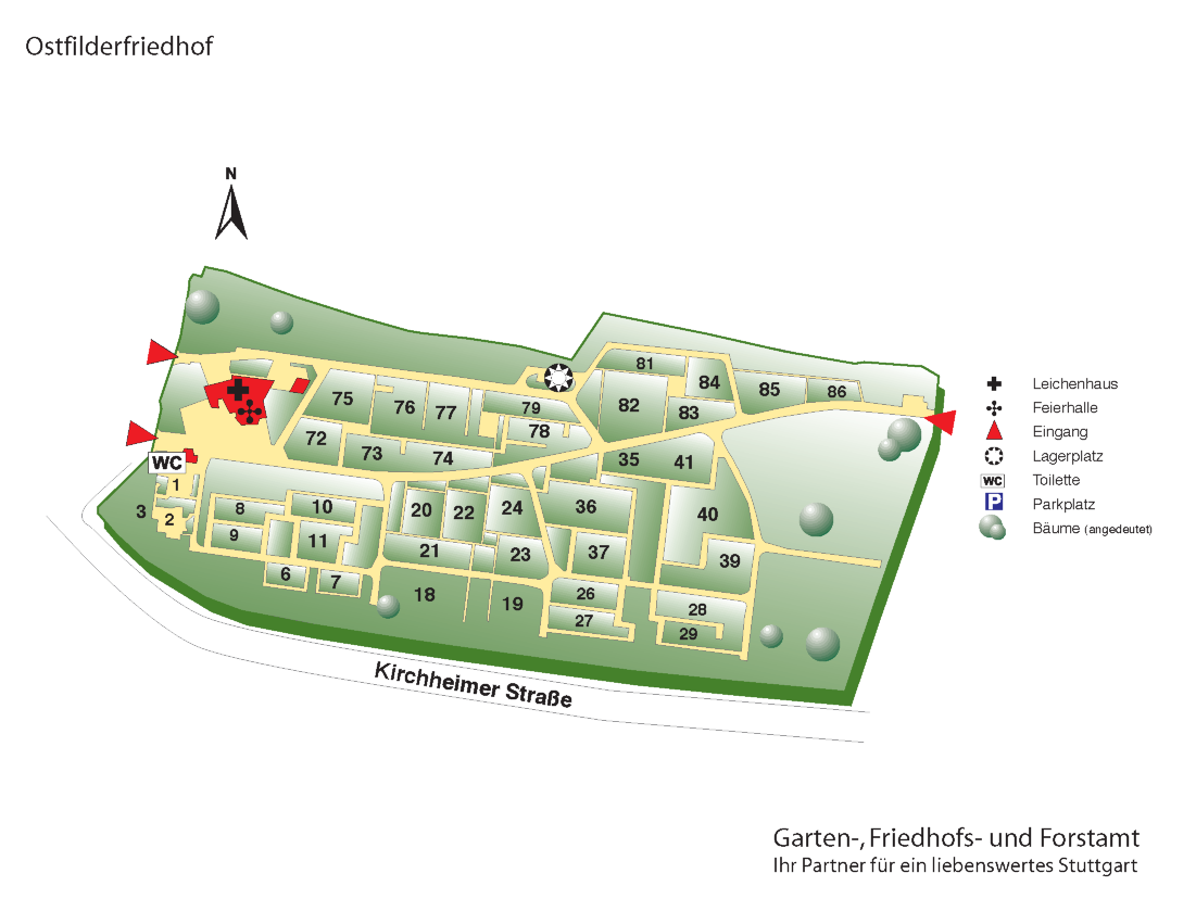 Ostfilderfriedhof in Stuttgart-Sillenbuch Übersichtskarte